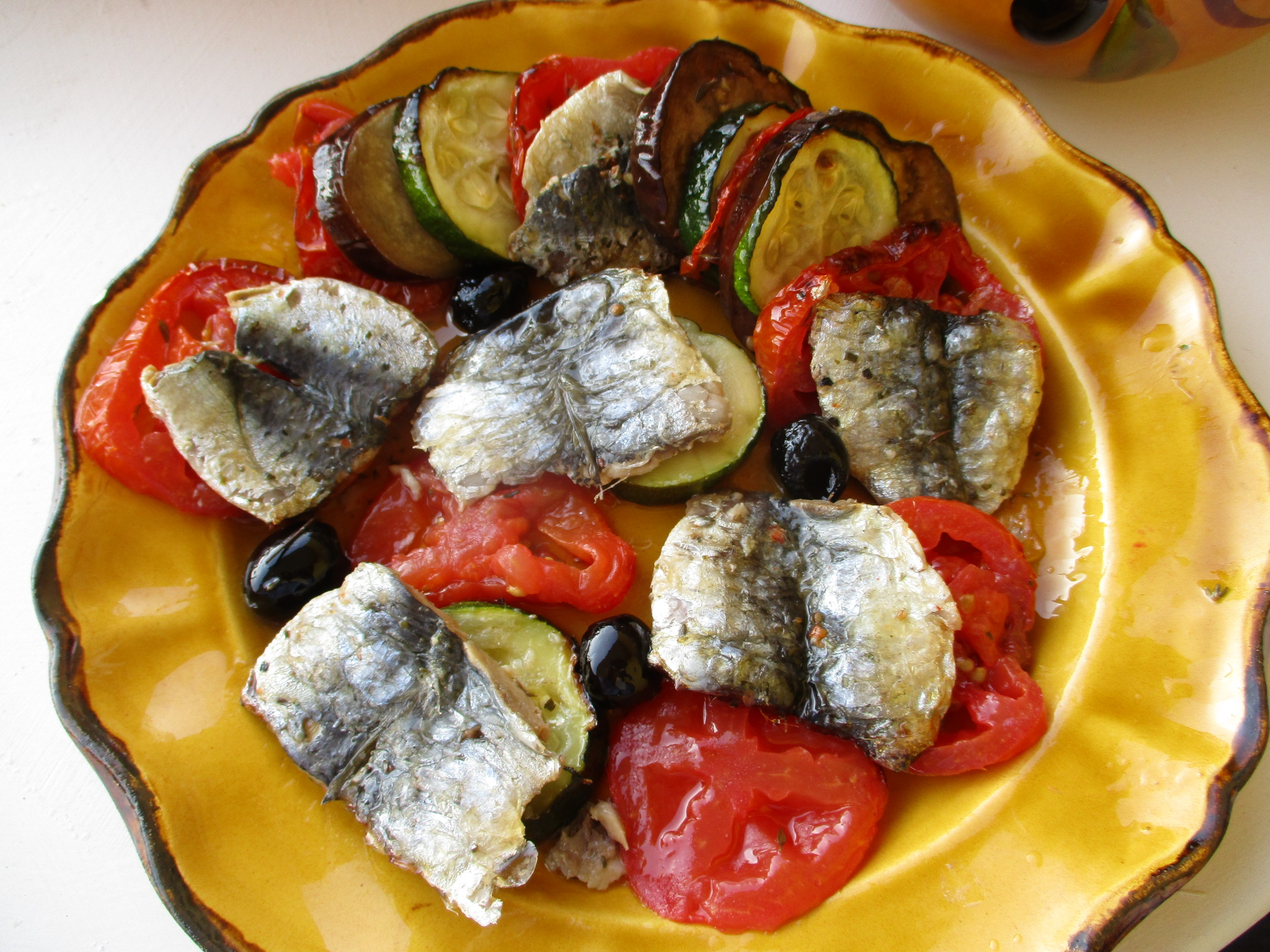 Tian aux sardines de Marseille